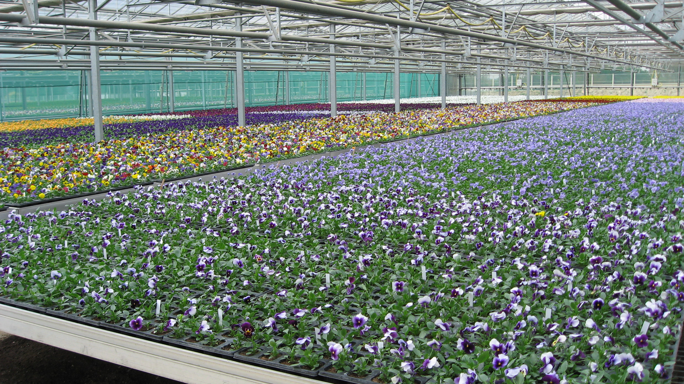 Viola sp. in Centre Horticole de la Ville de Paris